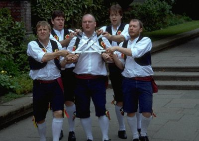 Die Newcastle Kingsmen Schwerttänzer beim Aufführen des Rapper-Kettenschwerttanzes (siehe Rapper Sword) in Mai 1999. Diese Figur ist die »Haymarket«, die vor lange Zeit von den Kingsmen erfunden wurde, und einen wichtigen Straßenkreuzung in der Innenstadt von Newcastle upon Tyne darstellt; an dieser Kreuzung gab es bis der 1980er eine von den Kingsmen sehr beliebte Kneipe namens »The Haymarket«